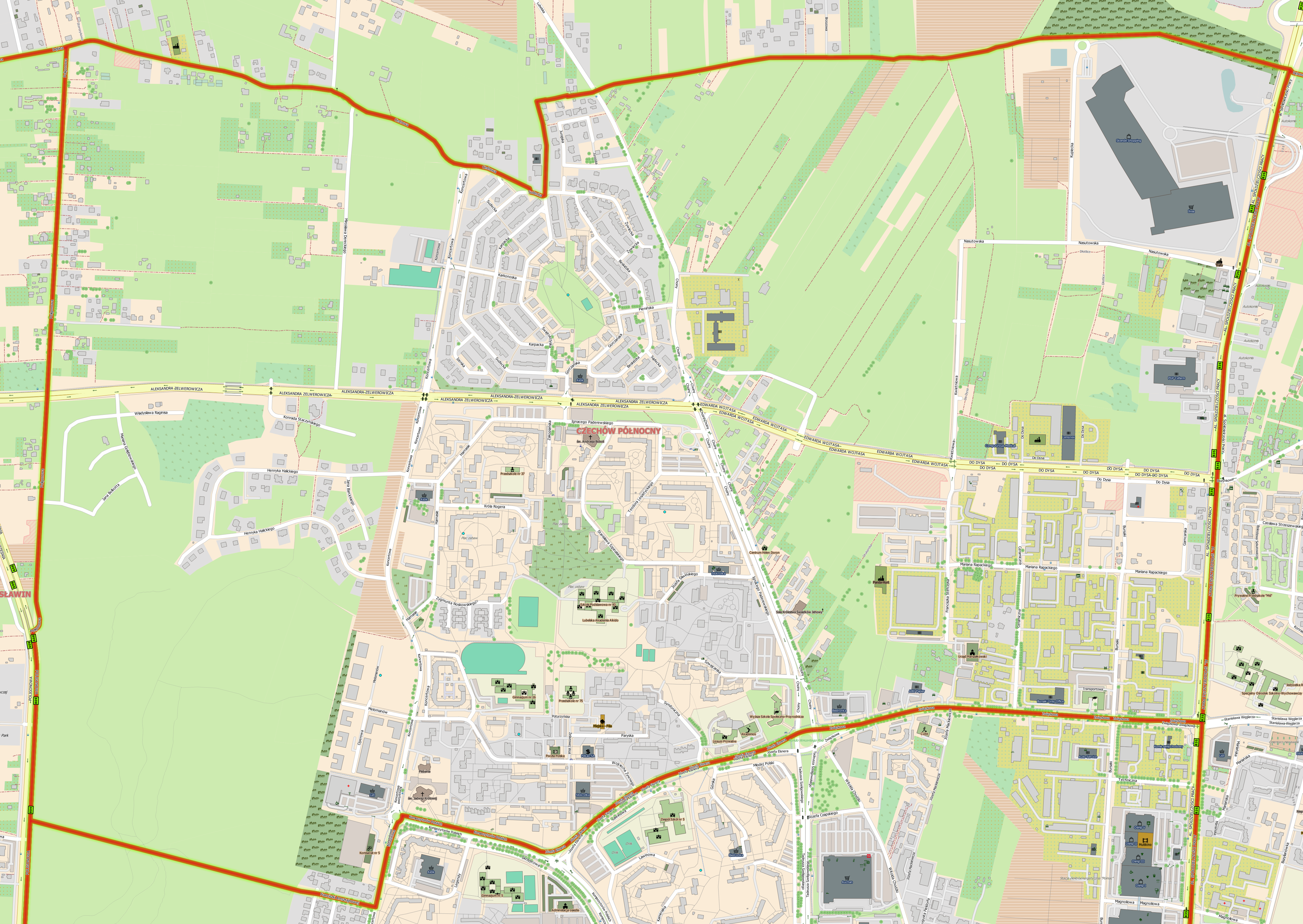 Plan dzielnicy Czechów Północny w Lublinie.